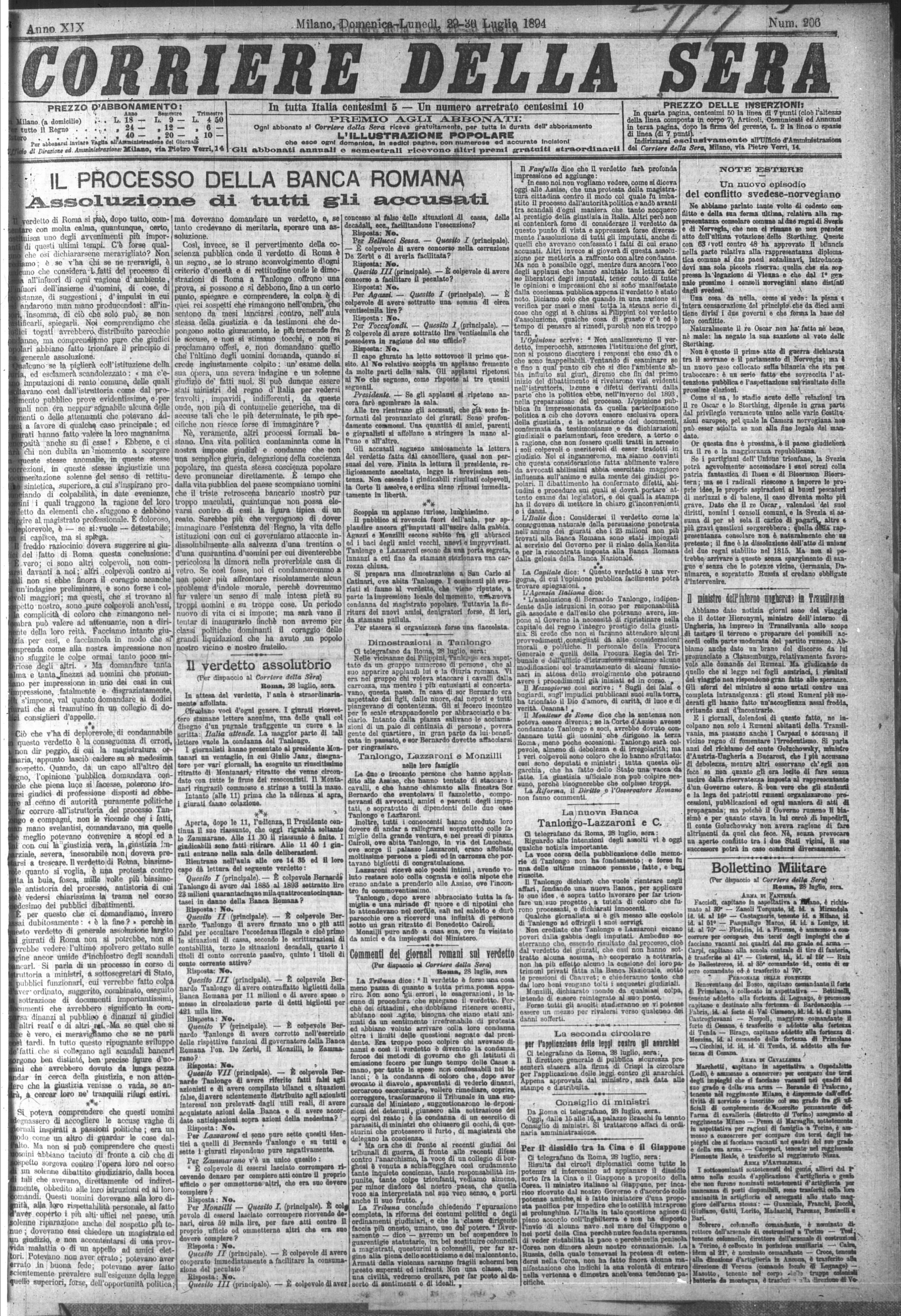 Corriere della Sera, 29-30 luglio 1894